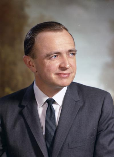 James A. Andersen, 1969